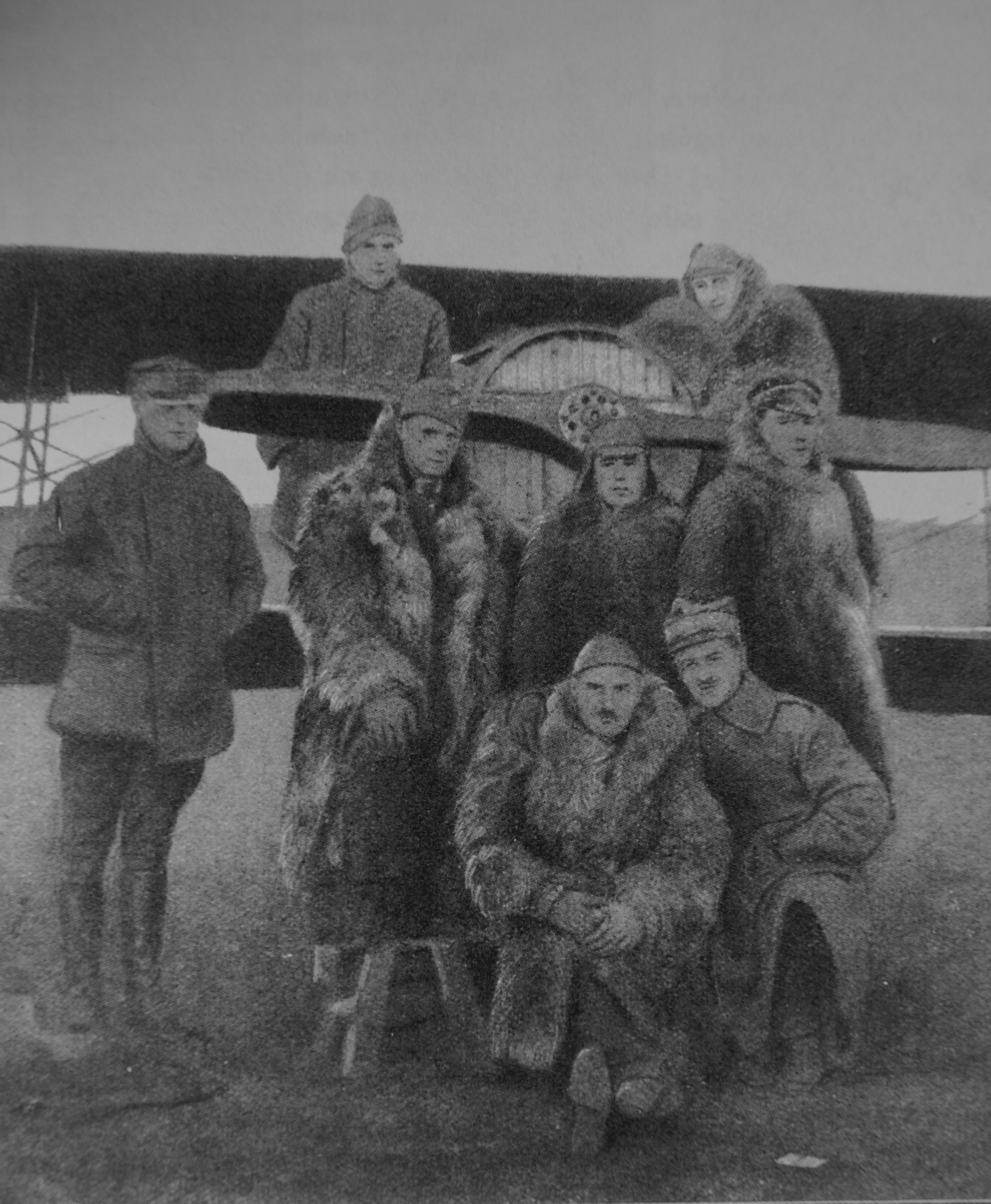 Oficerowie 19-ej eskadry myśliwskiej w Baranowiczach w październiku 1920: por. Rutkowski, por. Antoni Mroczkowski, ppor. Stefan Pawlikowski, ppor. Zbigniew Bieniawski, ppor. Wiktor Ryl, ppor. Władysław Turowski, ppor. Eugeniusz Guttmejer, ppor. Józef Krzyczkowski.